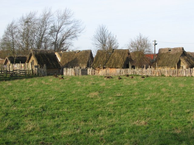 Murton Park Viking Village, York